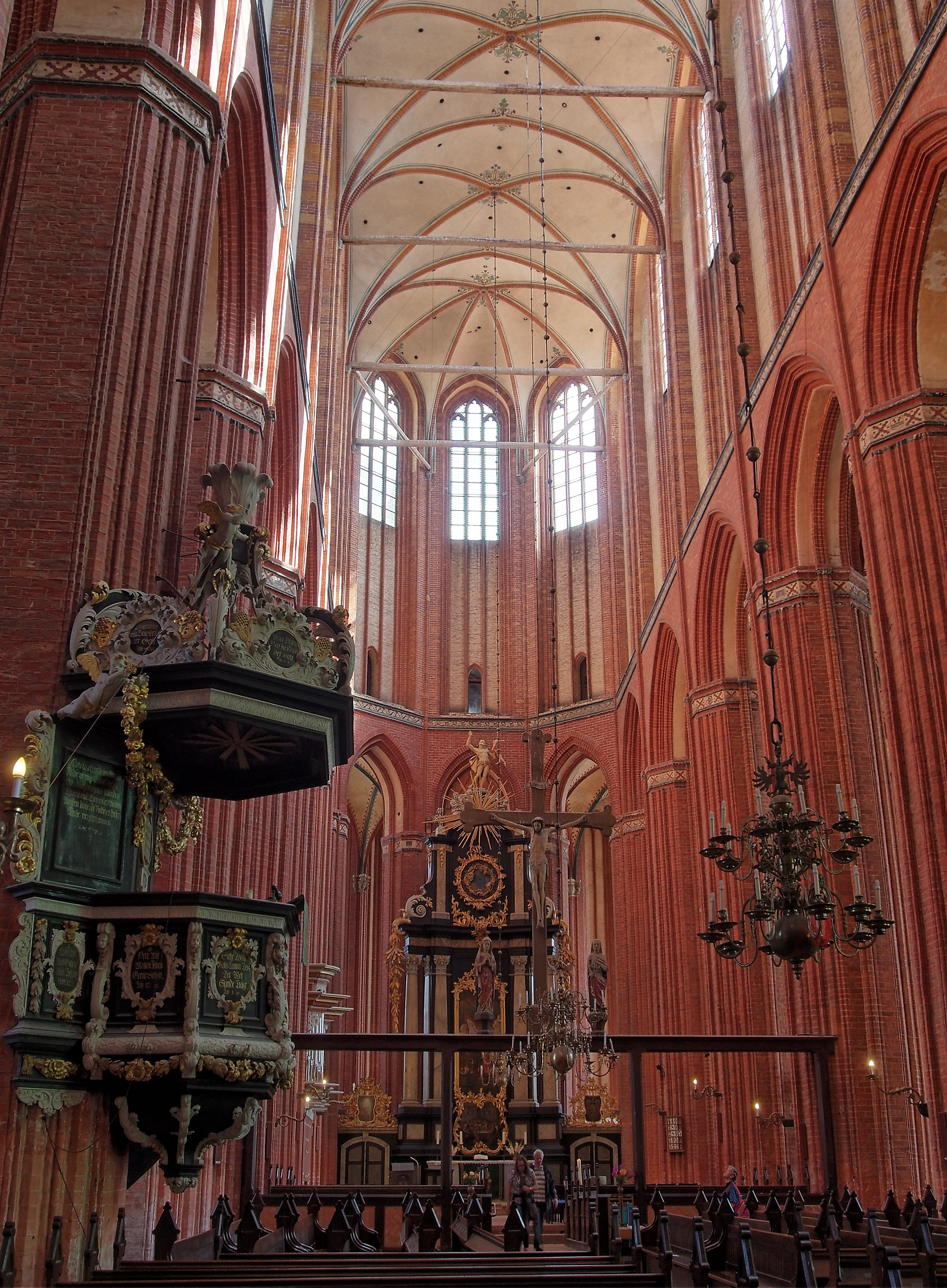 Innenansicht der Nikolaikirche in Wismar: östliches Kirchenschiff mit Kanzel, Triumpfkreuz und Hauptaltar